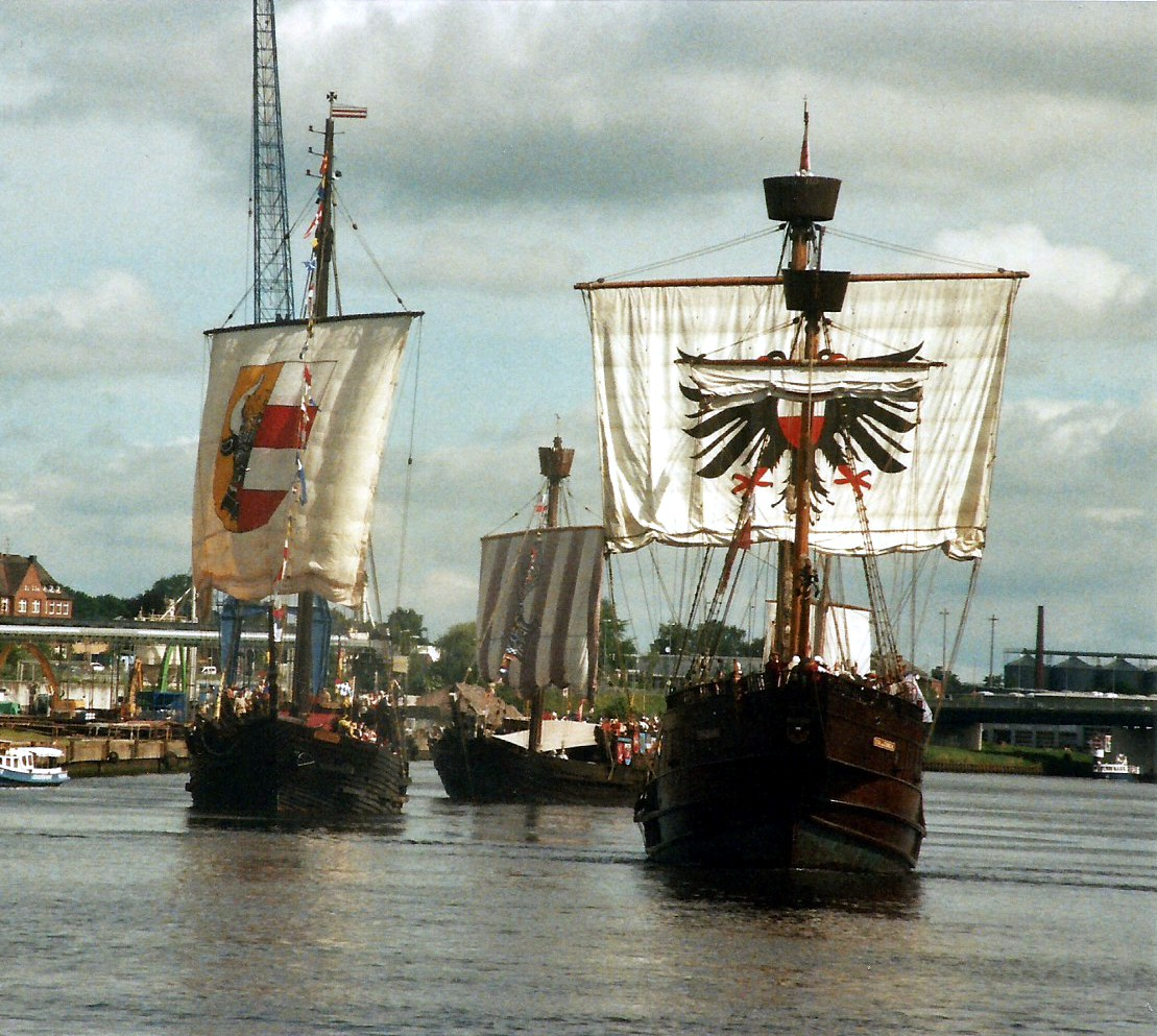 Die Schiffe kommen von der Seeschlacht